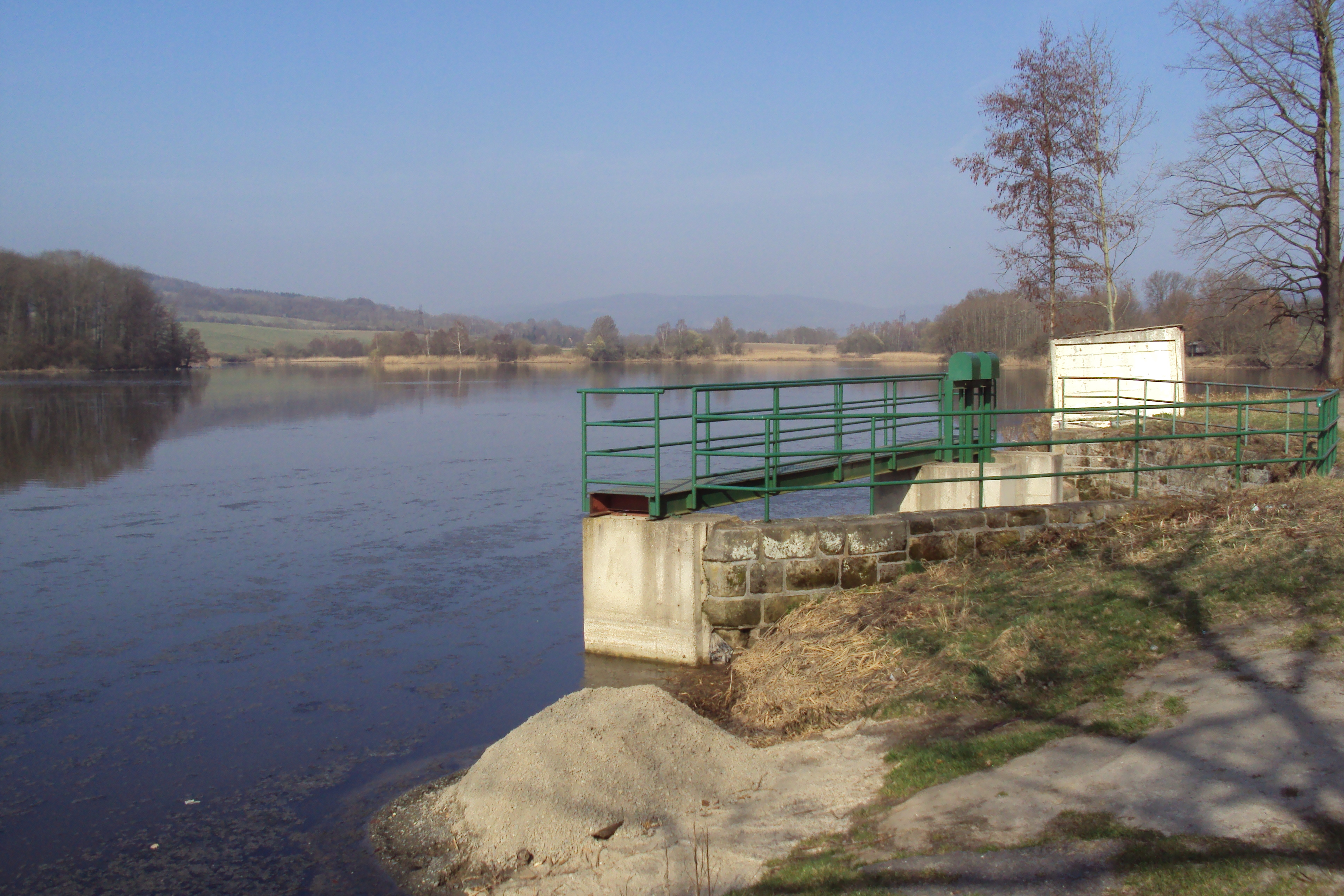 Dolanský rybník je na katastru Stvolínek, Českolipsko, hráz s výpustí